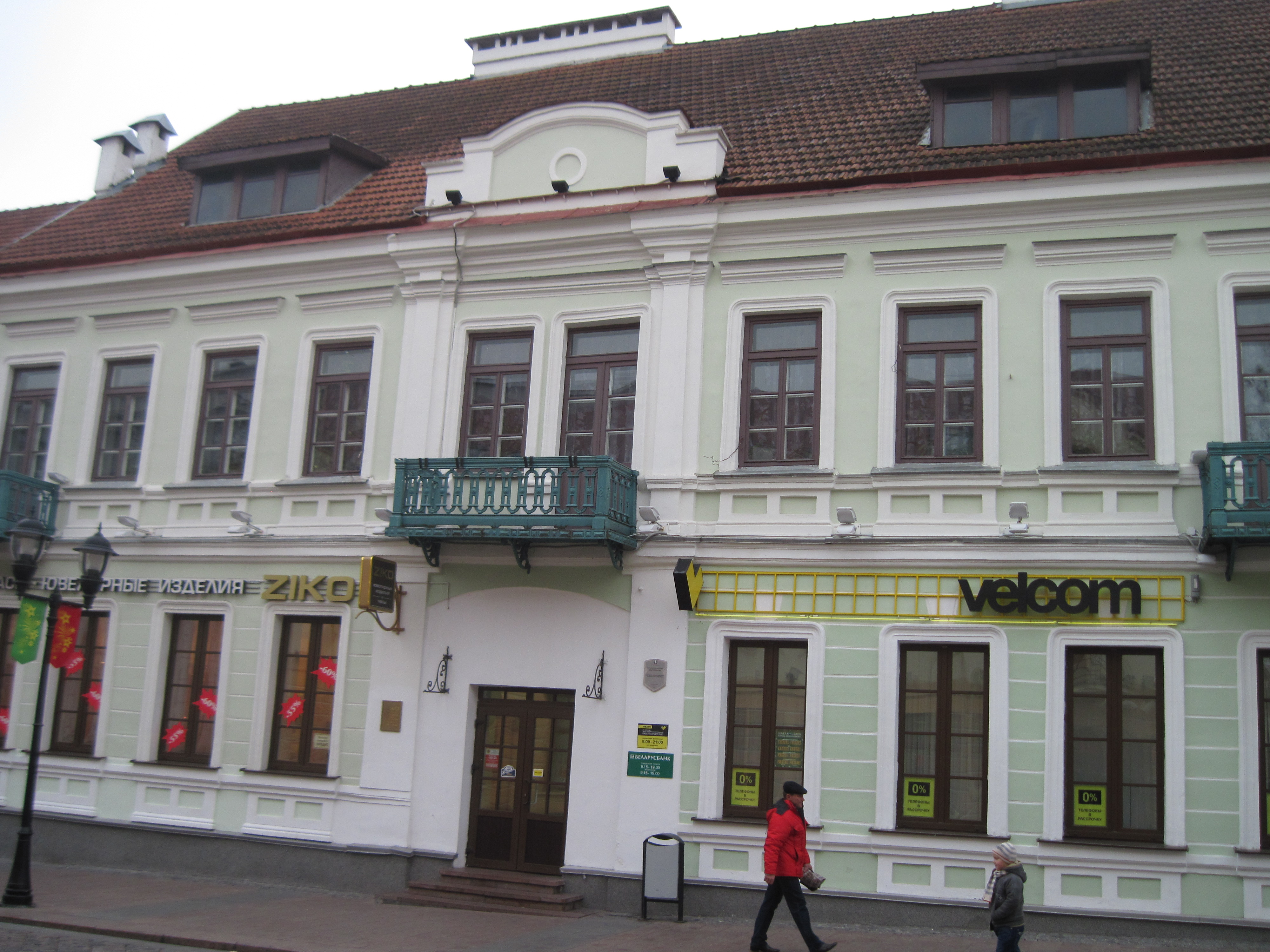 Беларуская (тарашкевіца): Здымак будынка па вуліцы Савецкая,25, Гродна